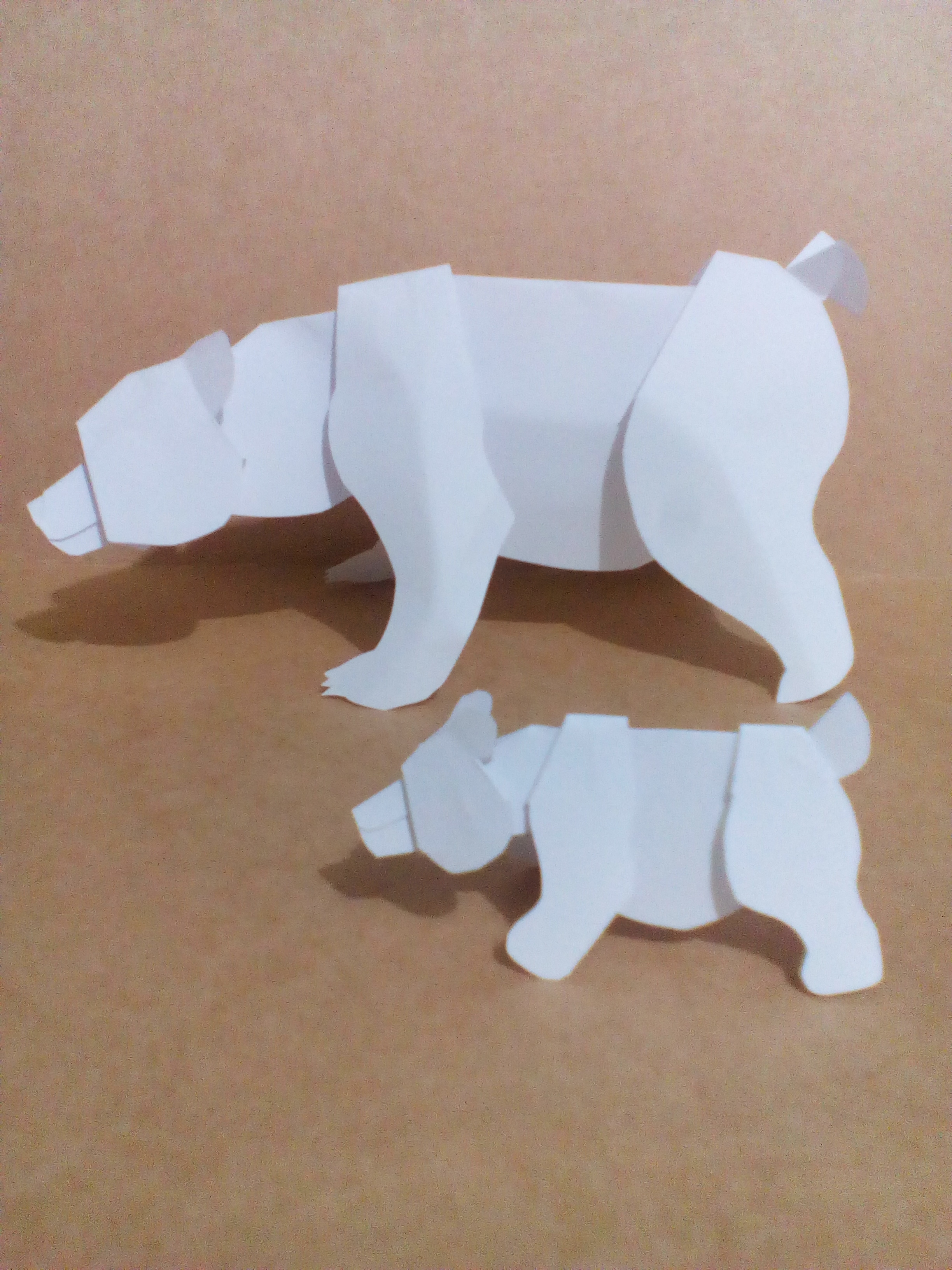 Kirigami Móvil, Articulación: Patas traseras, delanteras, hombros, cuello, cabeza y hocico.